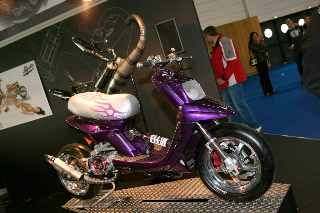 Booster Vince au Paris Tuning Show